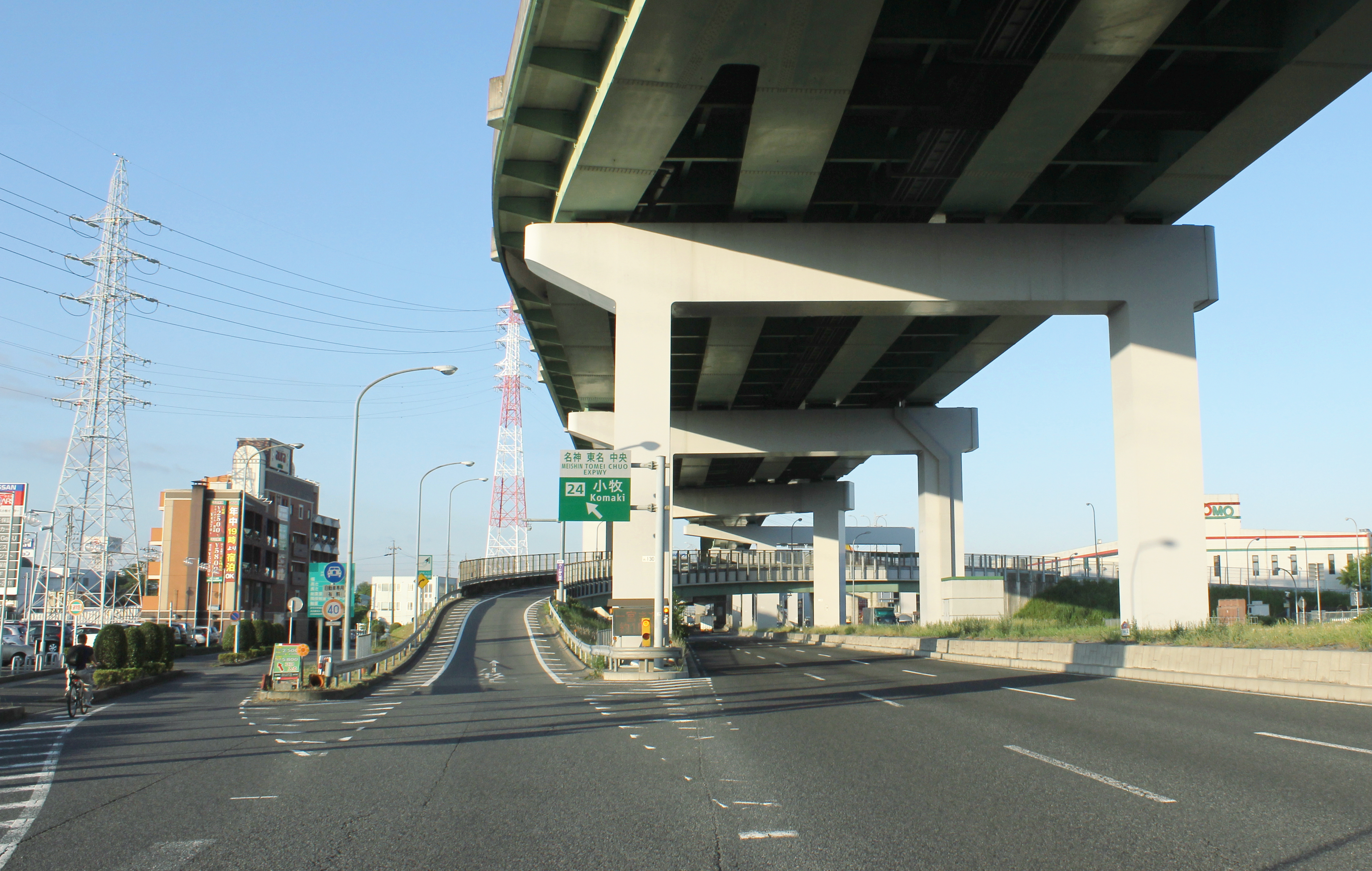 名神・東名 小牧IC入口（国道41号犬山方面側）